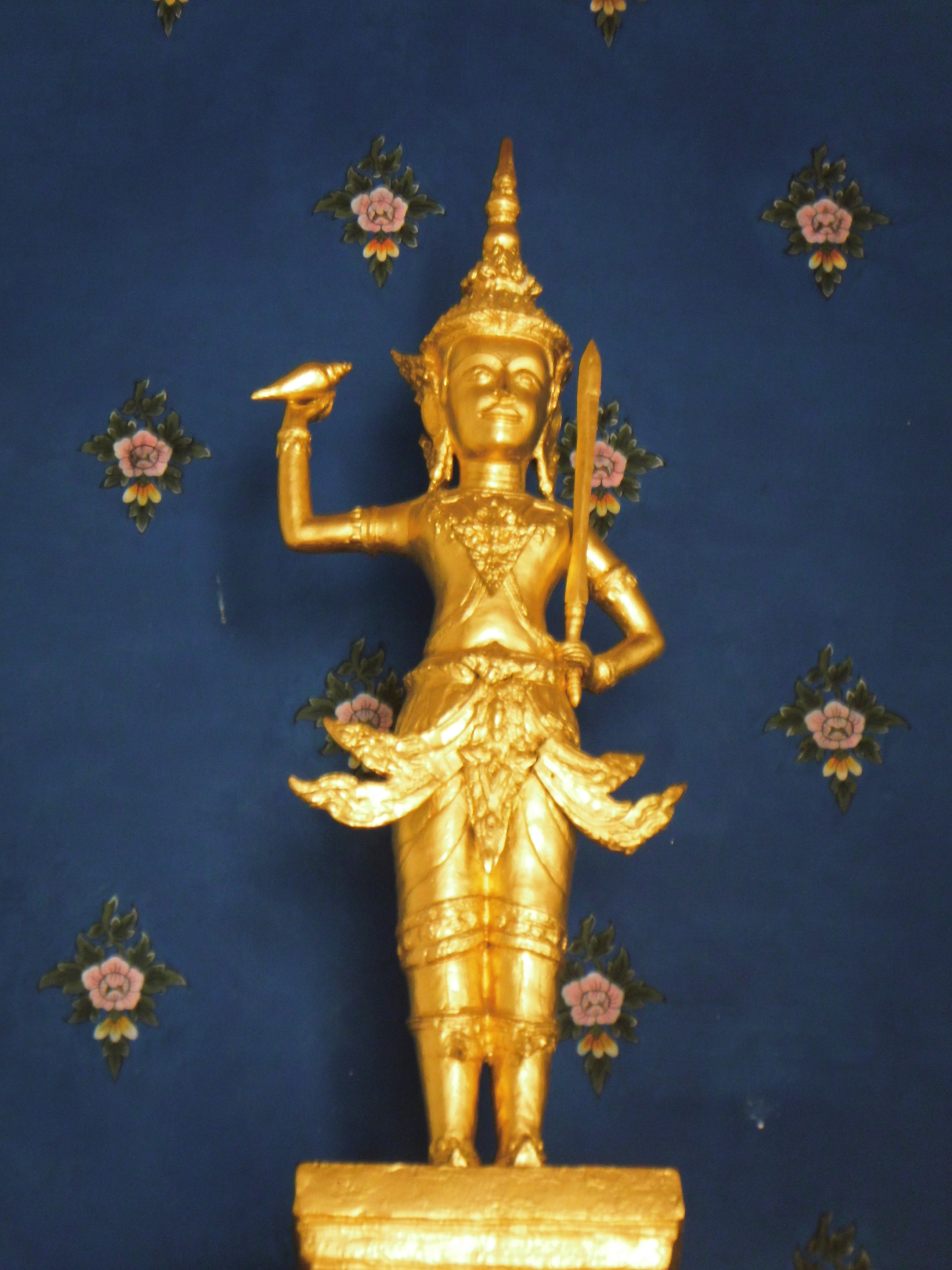 ศาลหลักเมือง